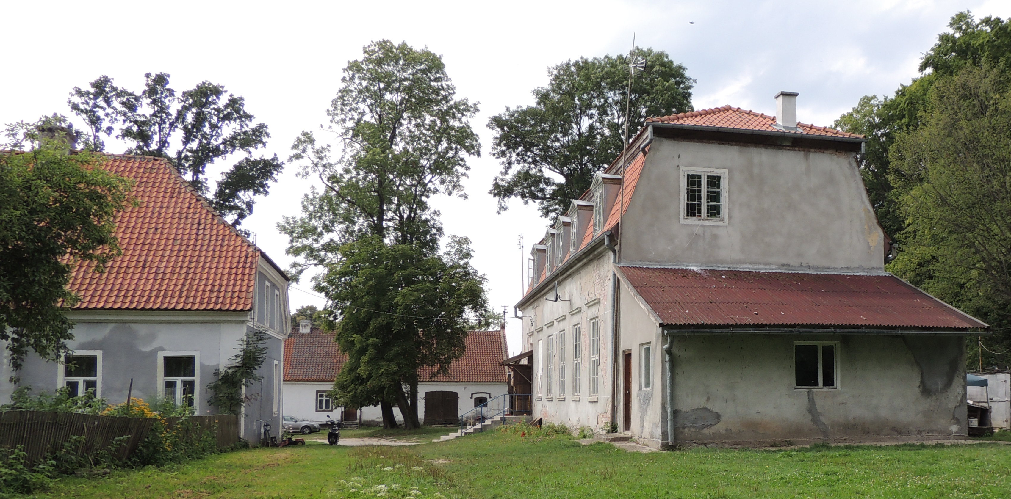 Ławki, zespół pałacowy, 1700, XIX